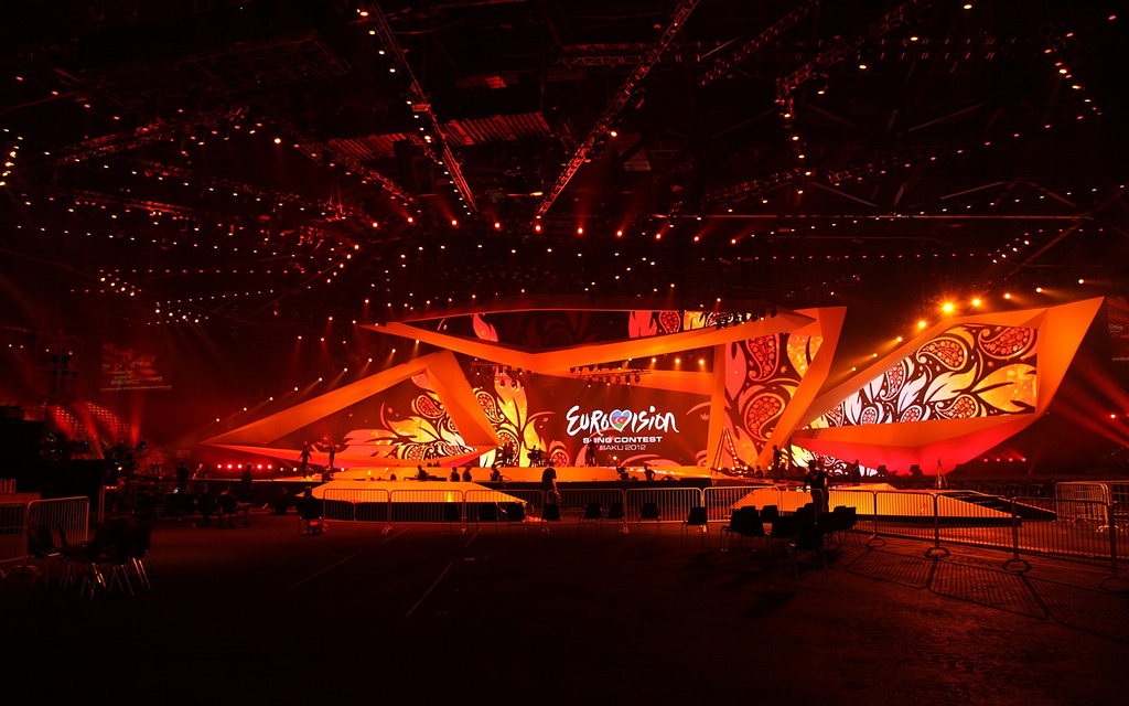 Crystal Hall Baku Inside